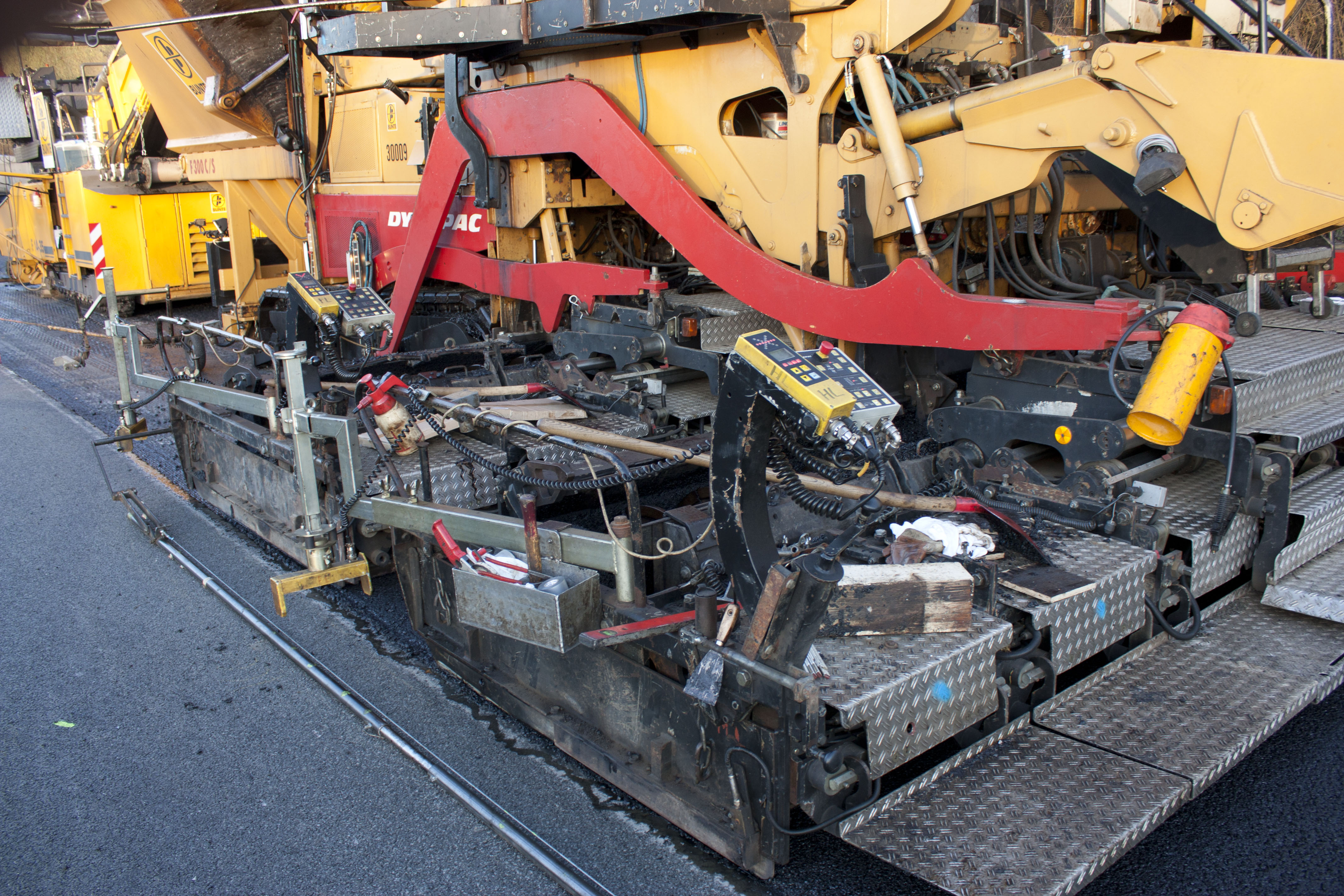 Einbaubohle eines Dynapac Kompaktasphaltfertiger des Bauunternehmen Bunte beim Einbau der Binder- und Deckschicht in einem Arbeitsgang auf der Bundesautobahn 7 zwischen den Anschlussstellen Kassel Nord und Lutterberg.